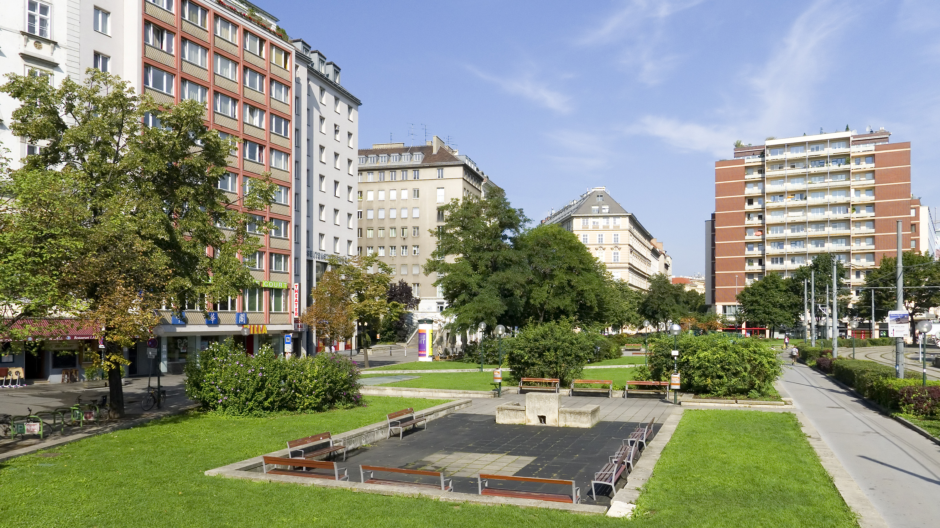 Grünfläche (ehemals Herminenhof) auf Schwedenplatz, anschließend Morzinplatz, im Hintergrund Leopold-Figl-Hof (rechts) und Palais Wickenburg (mitte) in Wien 1, Innere Stadt - Blickrichtung Nordwesten